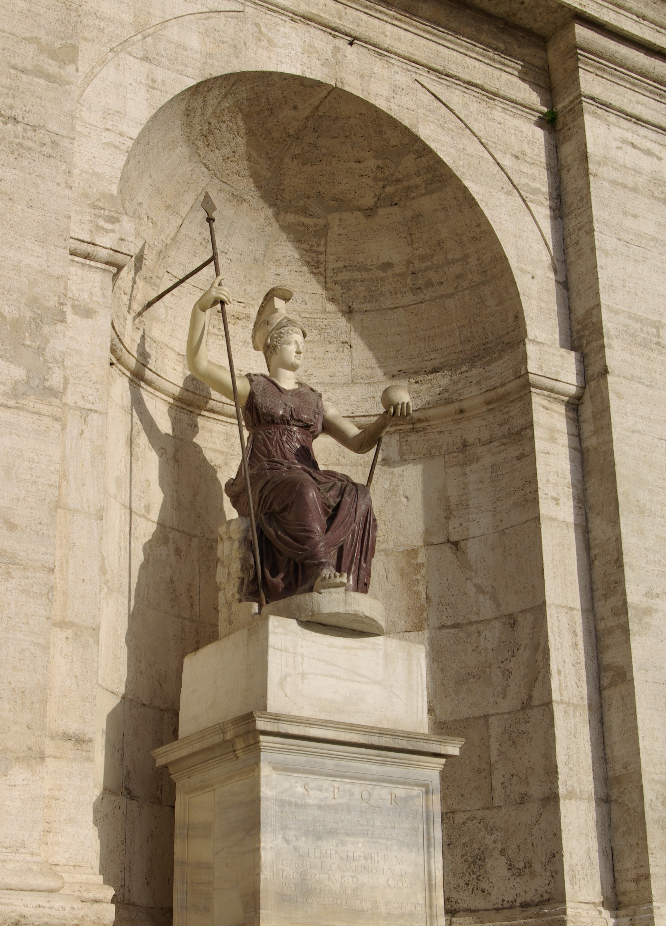 Ursprünglich antike Statue der römischen Gottheit Minerva die in der Renaissance in eine Statue der Gottheit Roma umgestaltet wurde. Auf dem Kapitolsplatz in Rom.